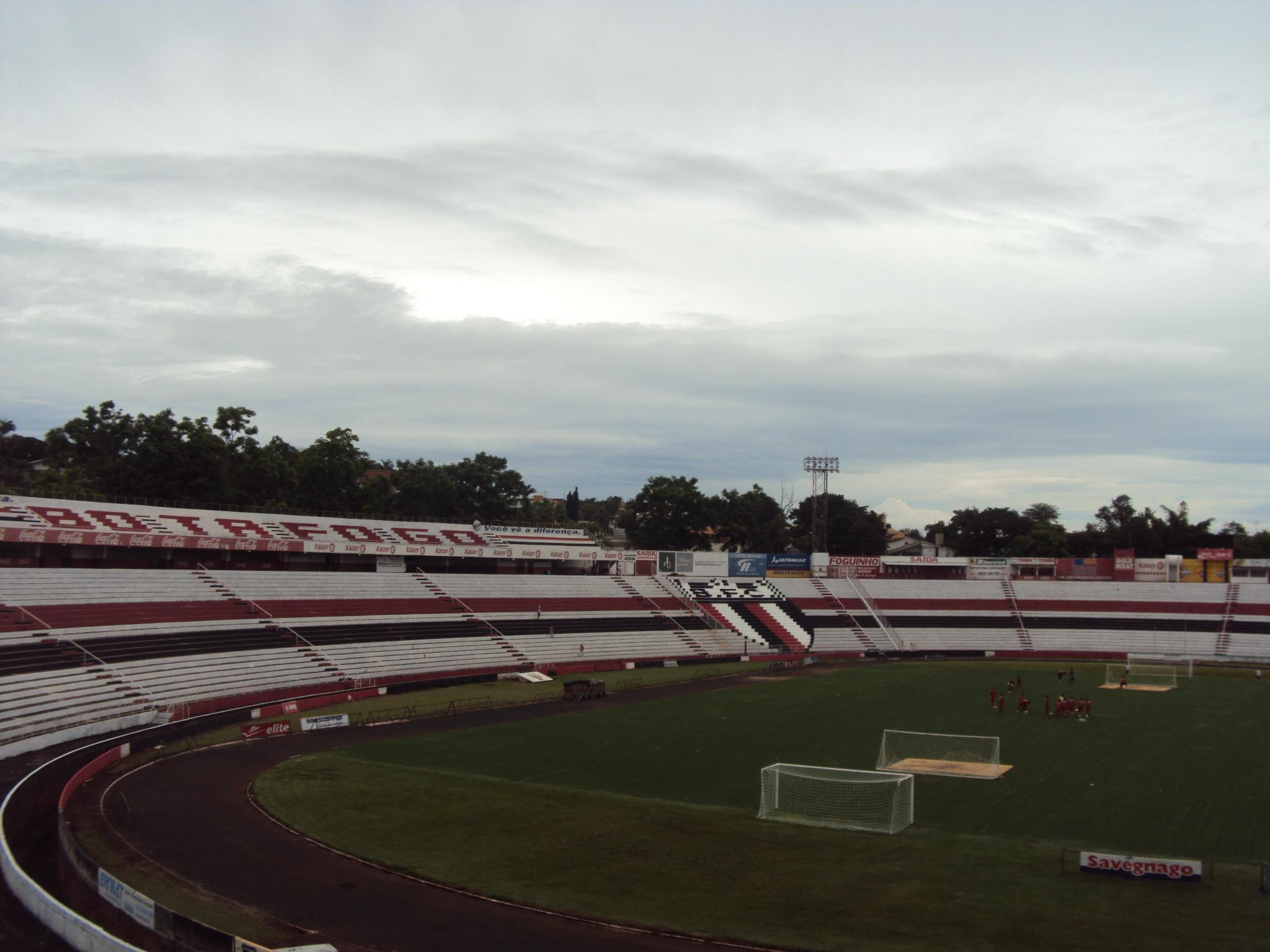 Estádio Santa Cruz, um dos maiores do interior do Brasil.